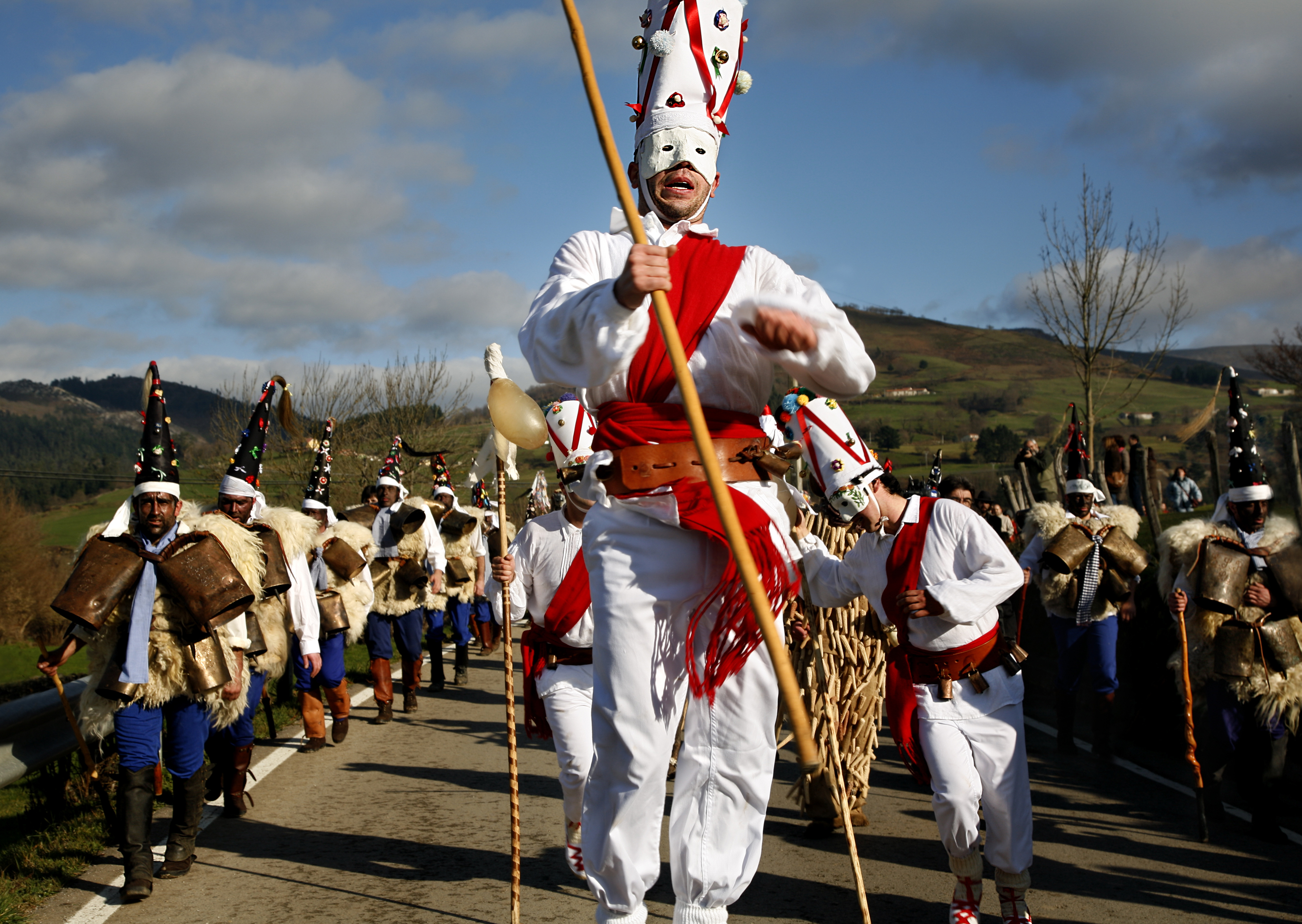 Asociacion cultural amigos de la vijanera de Silió